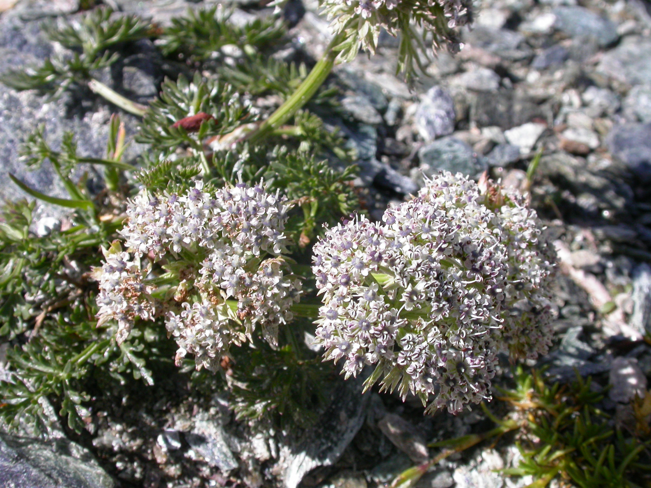 Ligusticum mutellinoides Zermatt, Riffelberg (Kanton Wallis, Switzerland), 2500 m Author: Barbara Studer – own photograph Date: 2.08.06